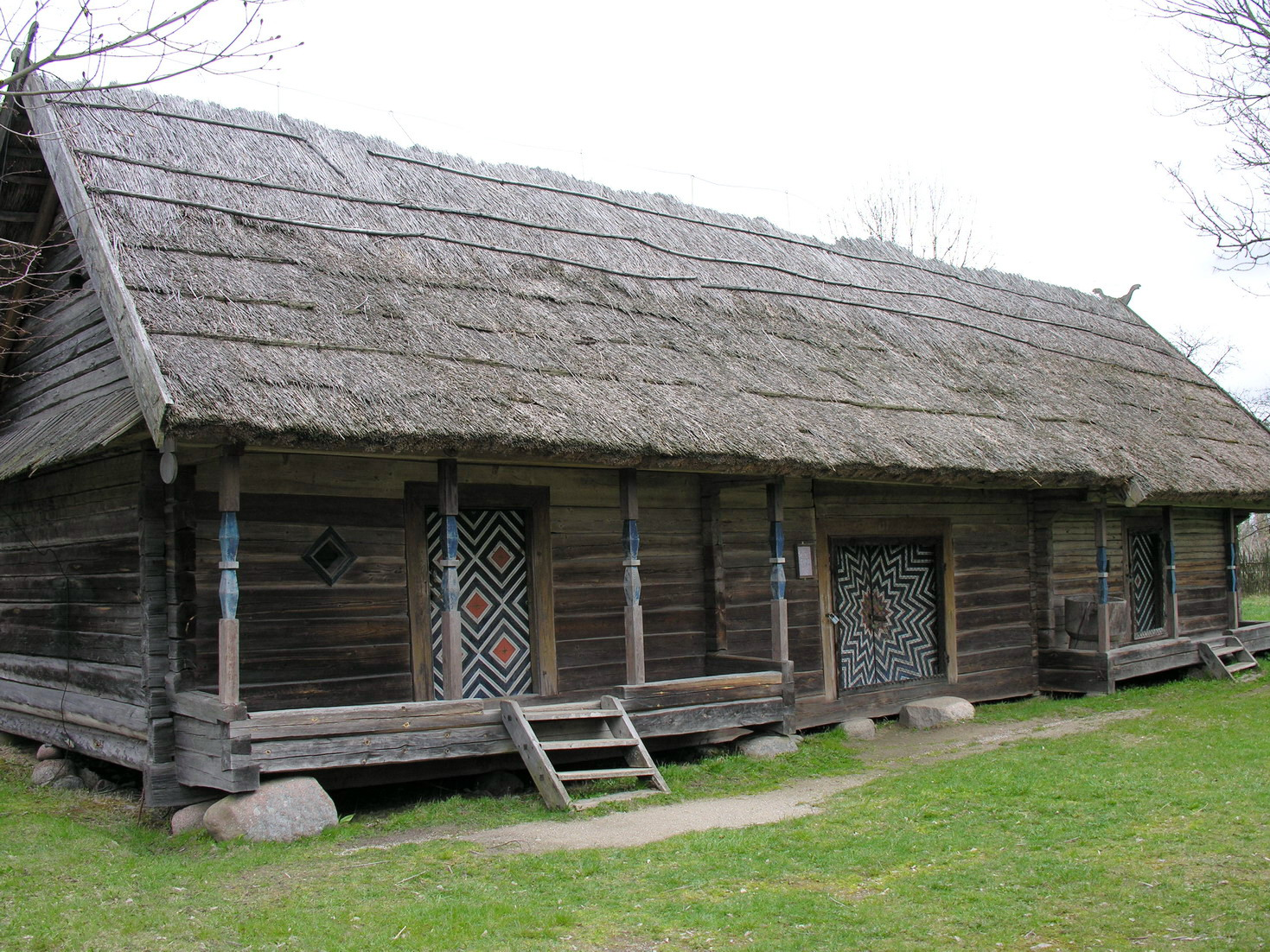 Svirnas 2007 m. balandžio 21 d., Lietuva